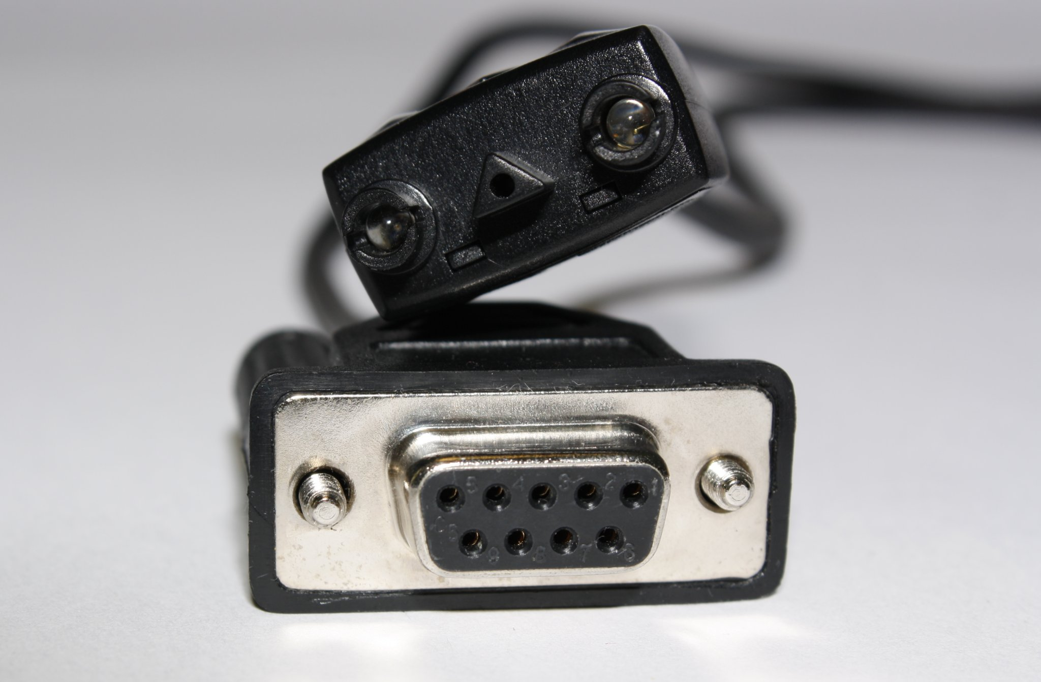 Lego Spybot VLL-Kabel mit PC-Anschluss